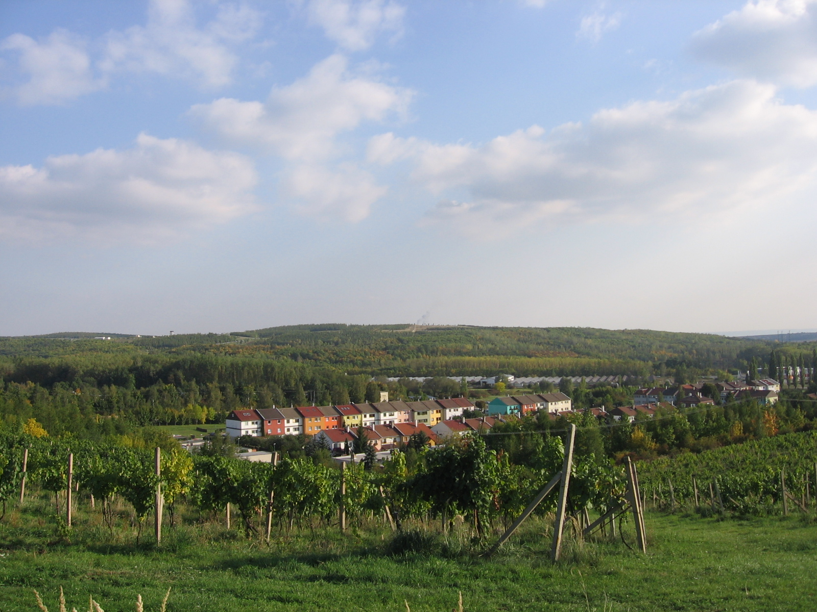 Pohled na Čepirohy a přilehlé vinice - 27. 9. 2008